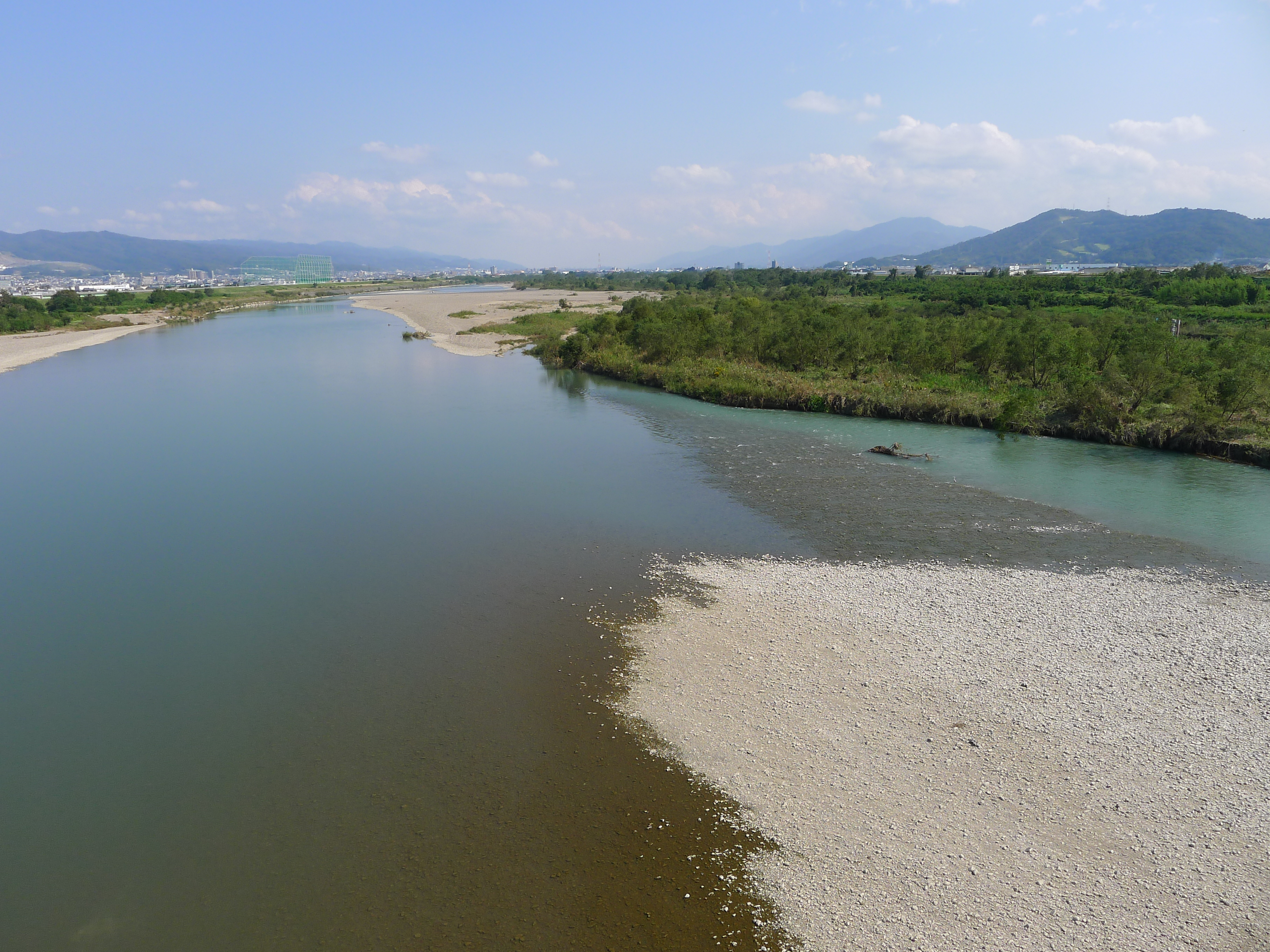 川辺橋の上から紀ノ川を眺める